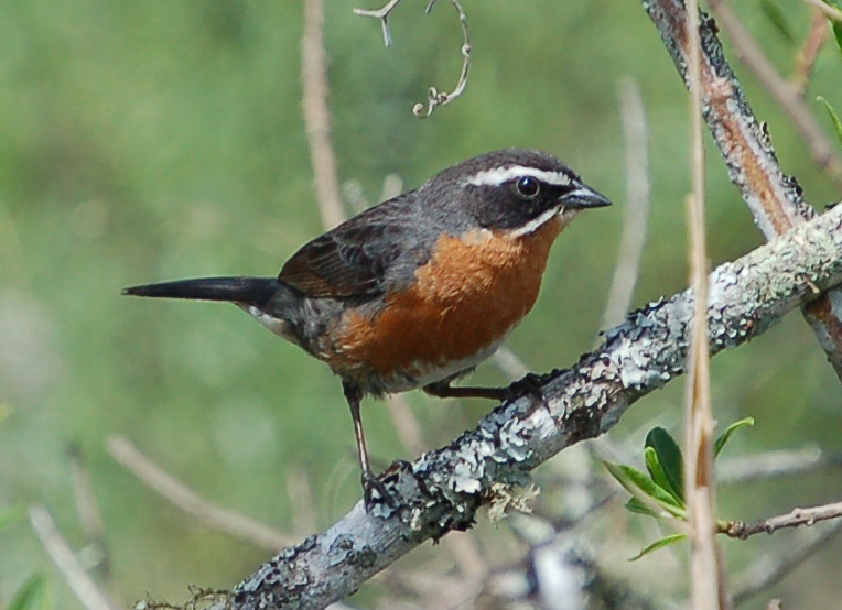 Poospiza nigrorufa siete vestidos